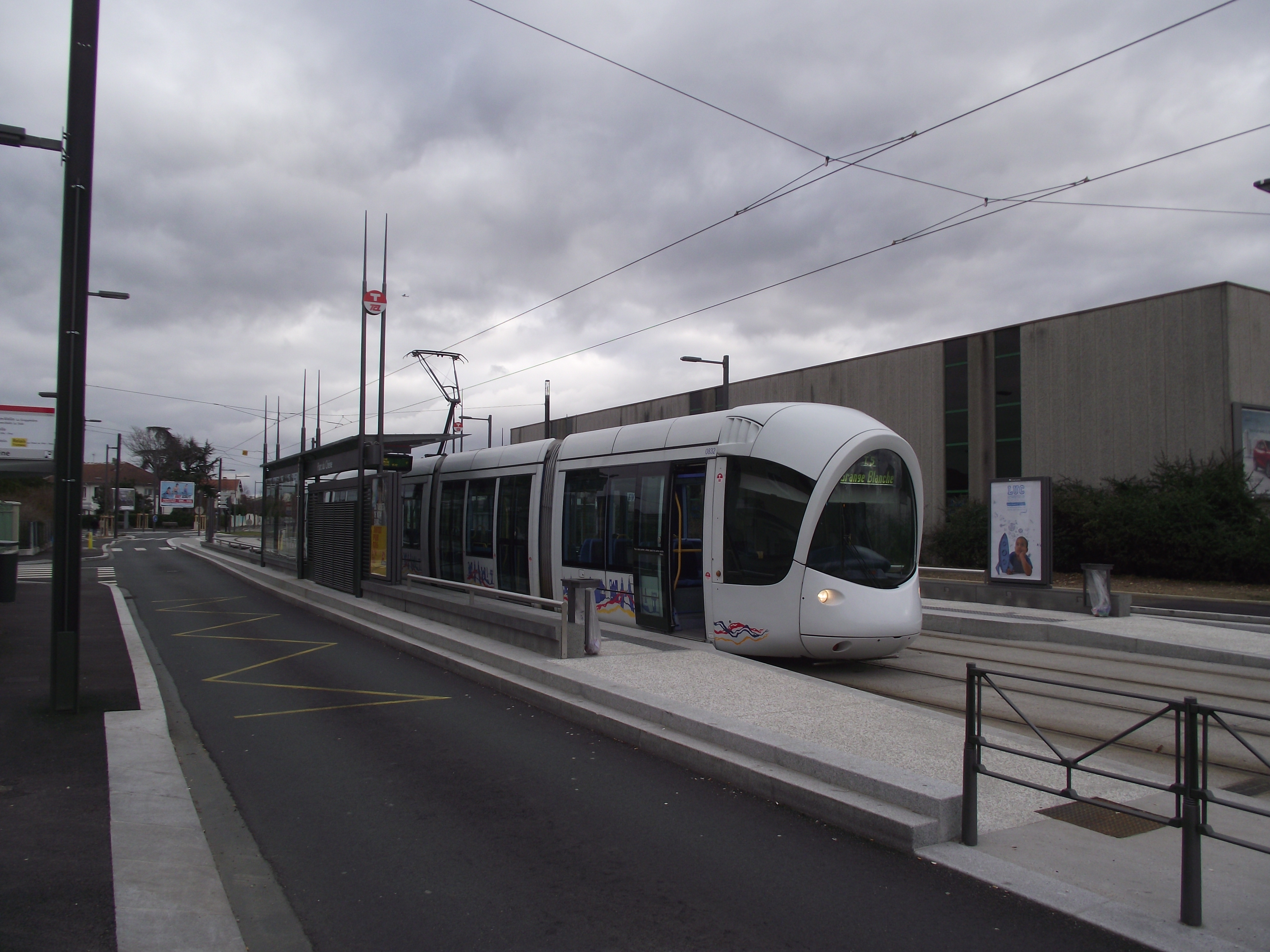 Tram klaar voor vertrek bij Parc du Chêne